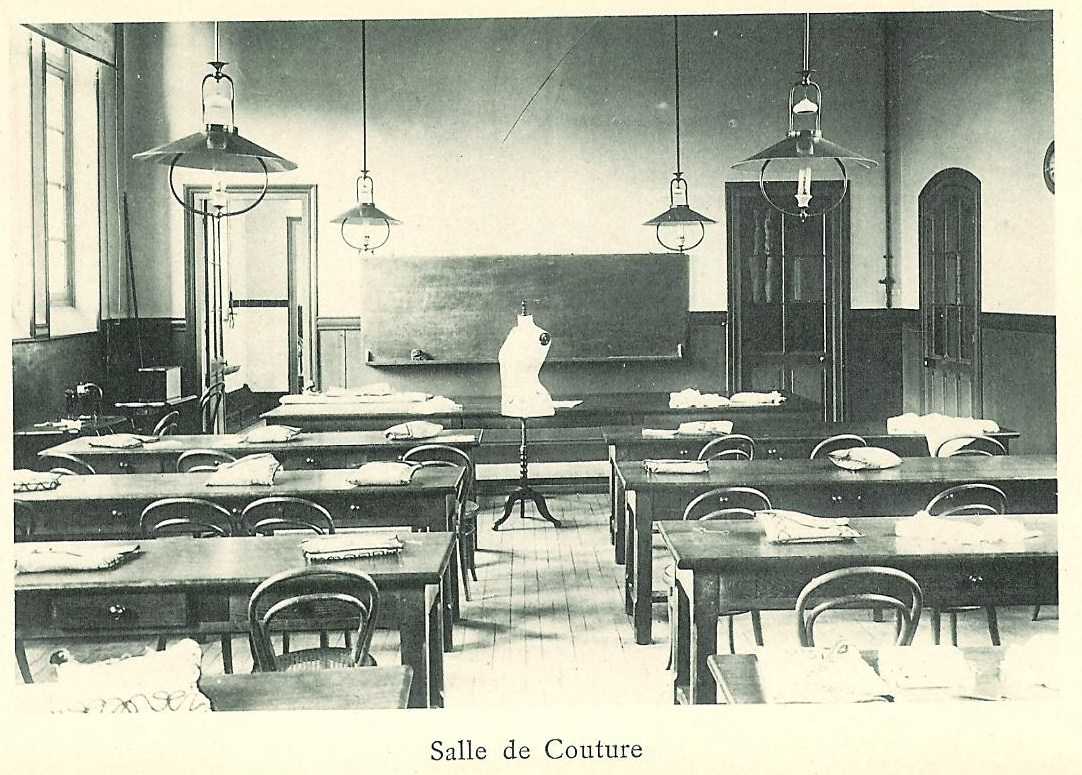 Salle de couture du lycée Molière (Paris)